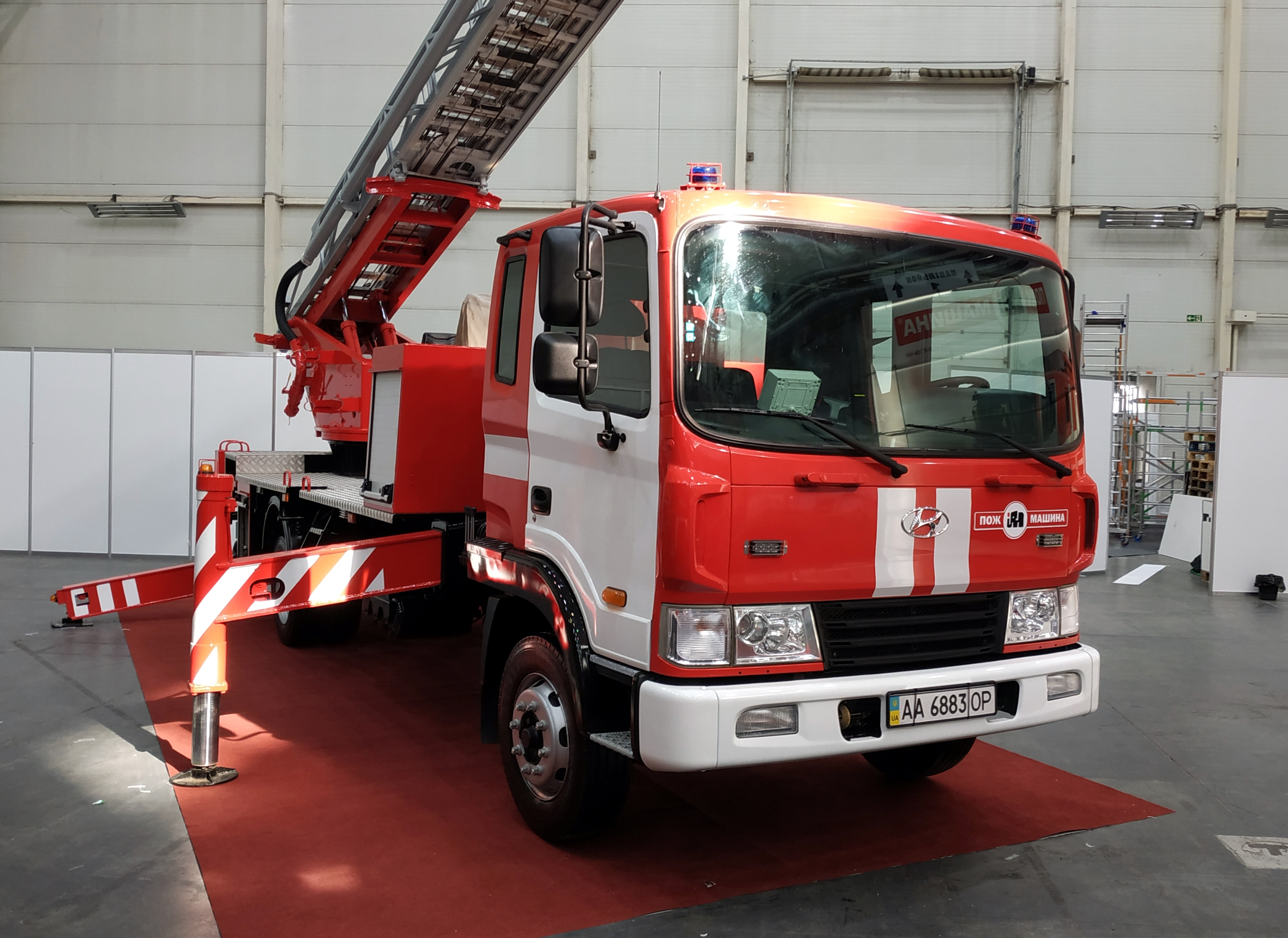 Автолестница пожарная АД-30 на шасси Hyundai HD120 в экспозиции завода "Пожмашина". Выставка "Зброя та безпека", Киев, октябрь 2019 г.